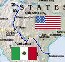 Río Bravo, kaart van CIA factbook